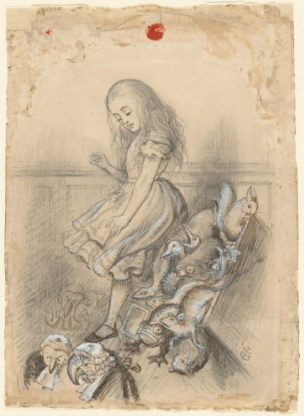 ジョン・テニエルによる、『不思議の国のアリス』挿絵のための下絵。第12章「アリスの証言」の場面。鉛筆に白色絵の具で強調。1864年ころ。